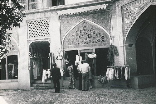 این تصویر وردی دالان اصلی را نشان می دهد که در آن زمان بسیار محدود در آن البسه سنتی فروخته می شده است